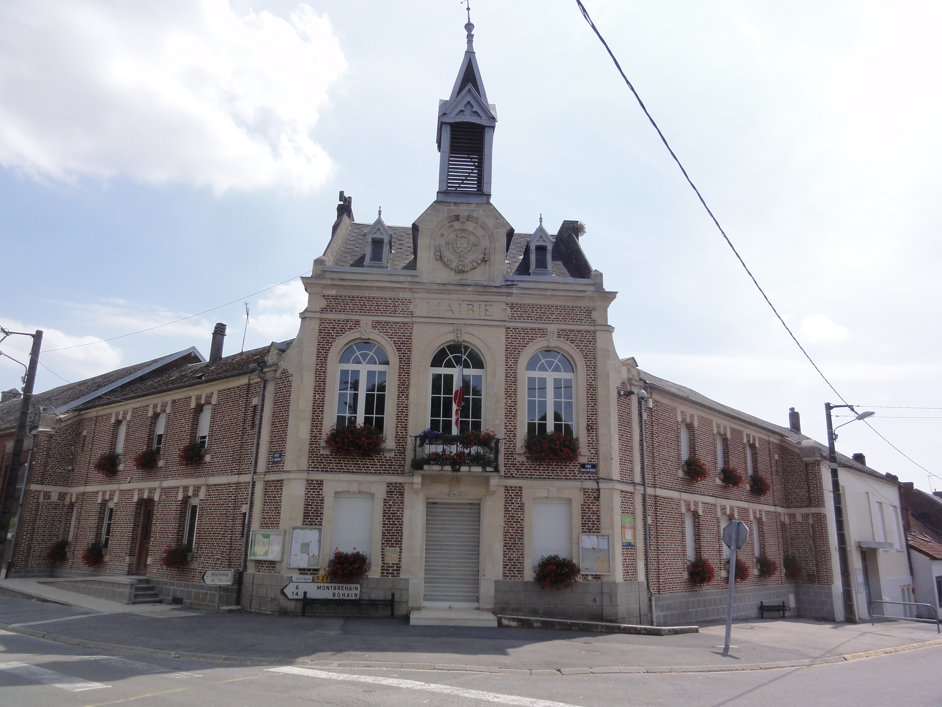 Beaurevoir (Aisne) mairie